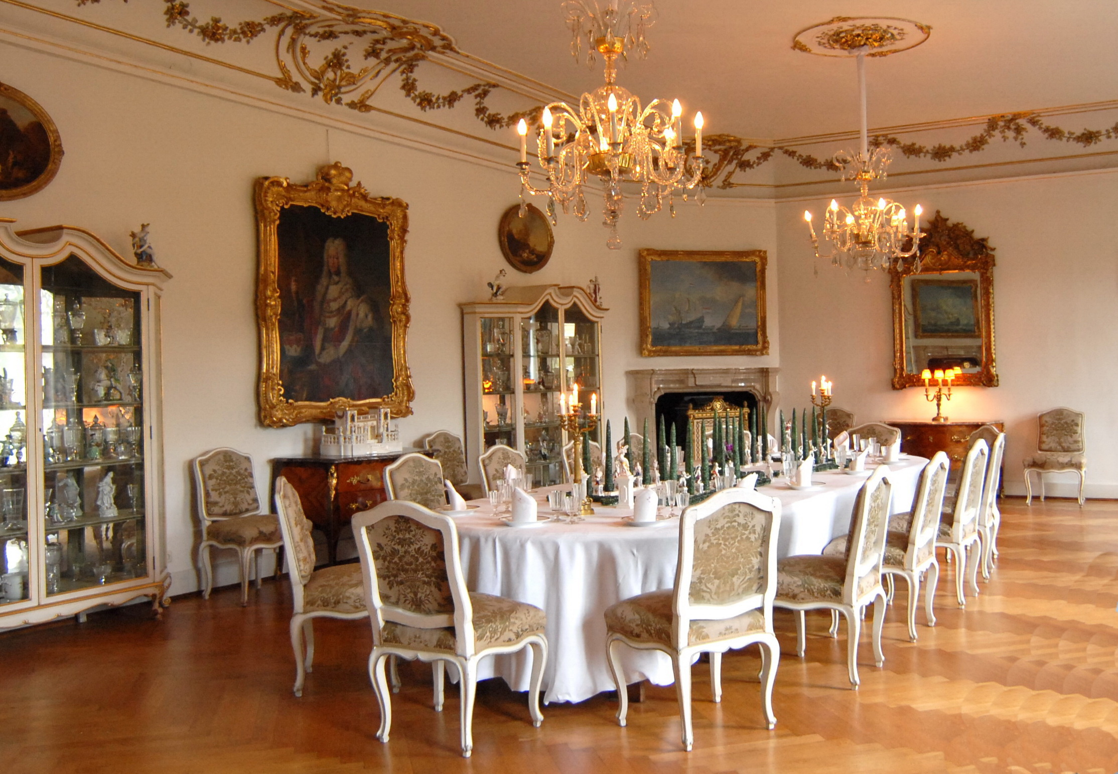 Der große Speisesaal im Königlichen Schloss Berchtesgaden (ehem. Augustiner-Chorherrenstift) mit Tafelaufsatz aus Nymphenburger Porzellan